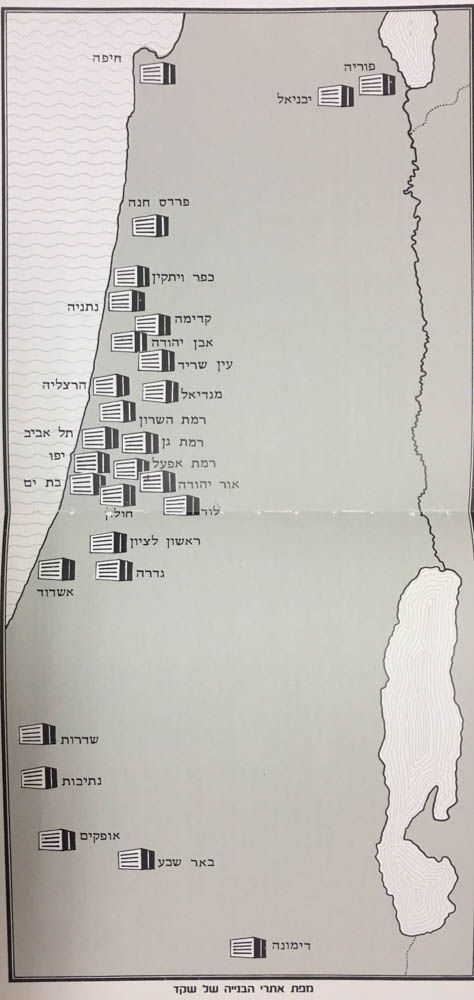 ישובים בארץ שנבנו על ידי משפחת שקד בשנים 1950-1971